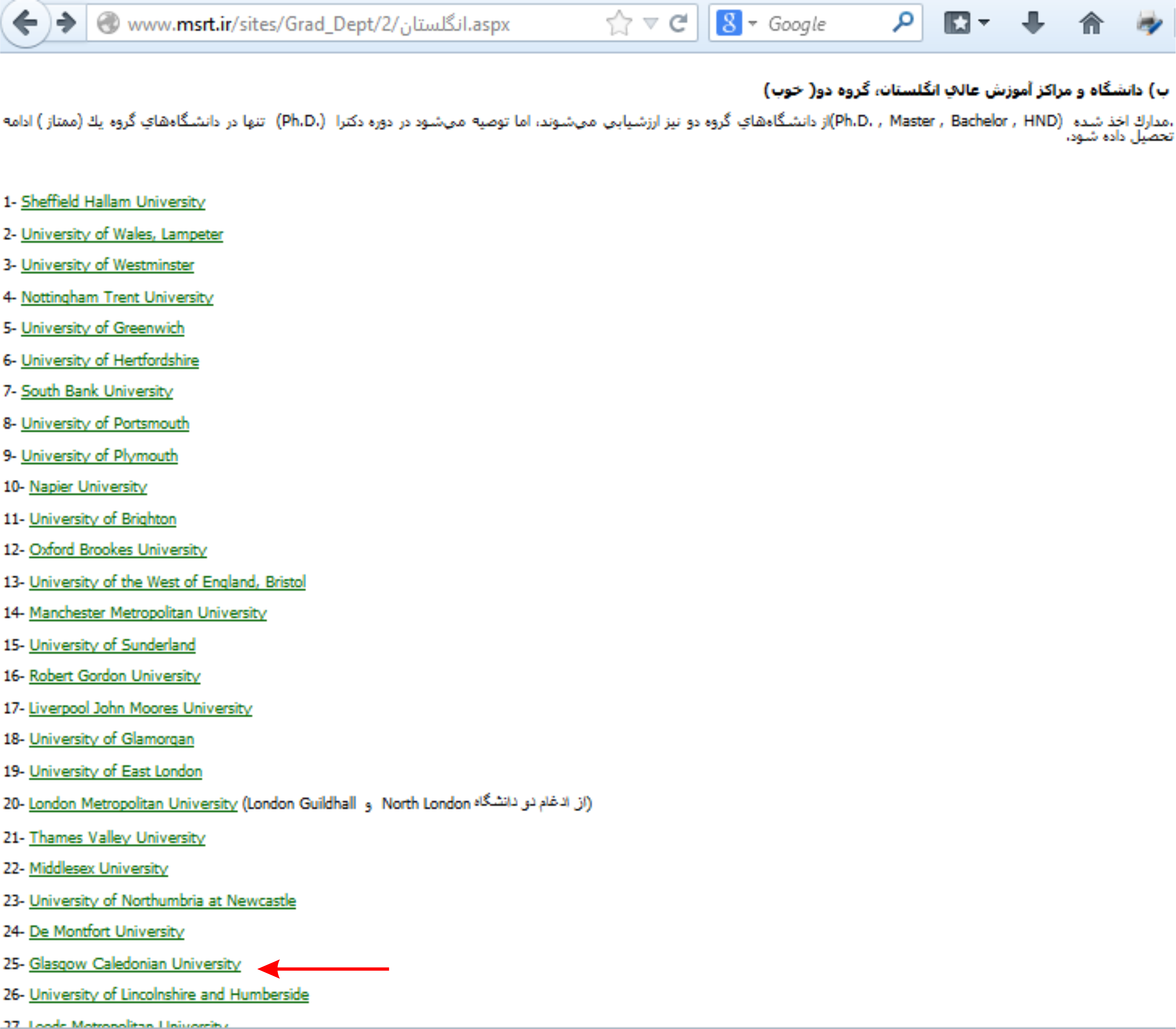 دسته بندی دانشگاه کلدونین گلاسگو در سایت وزارت علوم